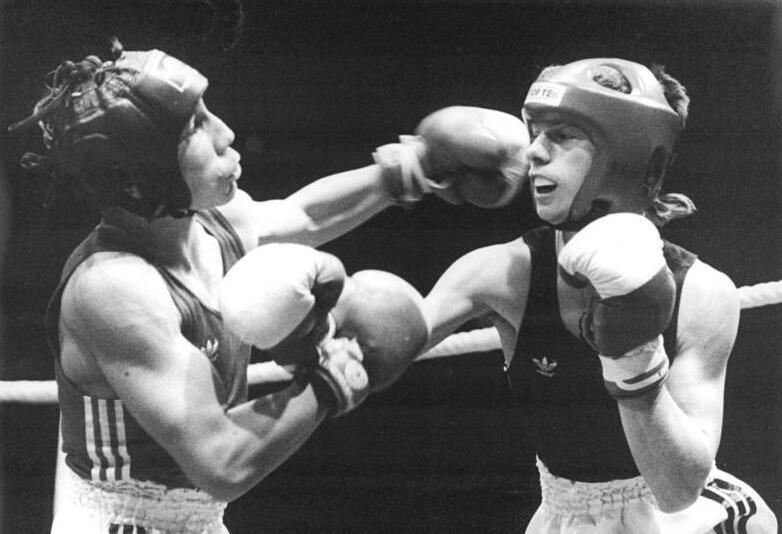 Jan Quast, Uwe Krane ADN-ZB Sindermann 21.11.87 Rostock: Boxländerkampf DDR-BRD-Die DDR-Boxer errangen im ersten Länderkampf gegen die BRD am 20.11.87 in der Rostocker Sport- und Kongreßhalle einen klaren 20:4-Sieg. Glänzender Auftakt in der Klasse bis 48 kg (Halbfliegengewicht). Jan Quast (DDR, l.) siegte mit einem RSC in der ersten Runde über Uwe Krane (BRD).